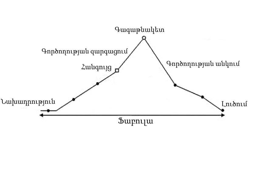 Կոնֆլիկտի զարգացման հաջորդական աստիճանները